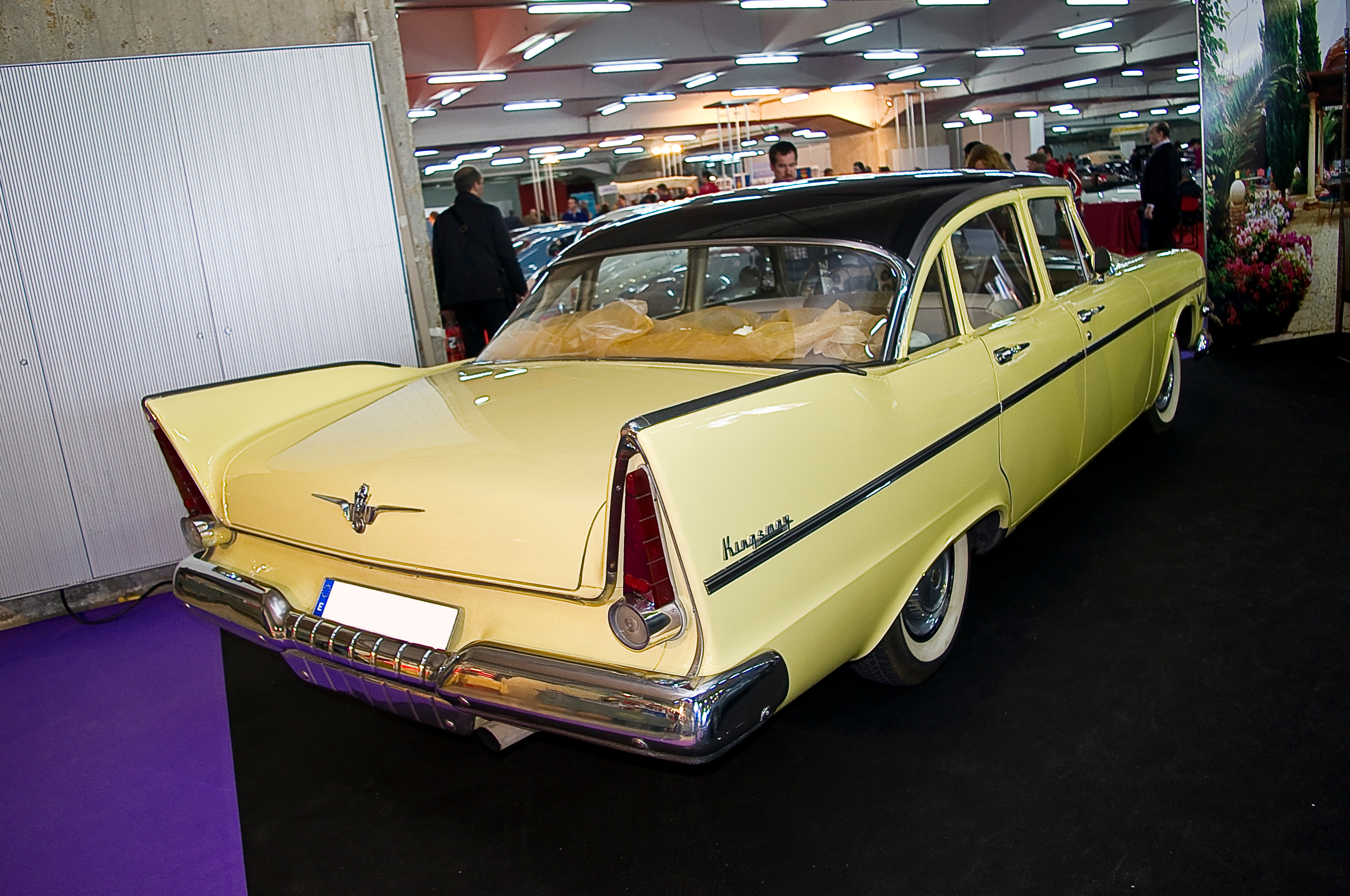 1957 Dodge Kingsway